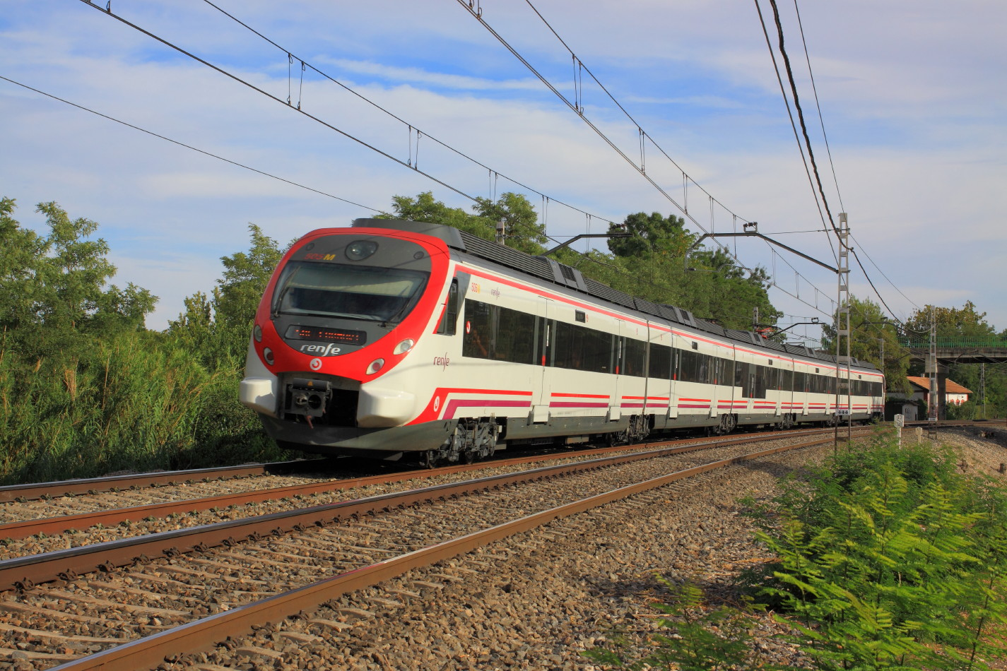 Aranjuez. UT-465 con cercanias a Madrid-Chamartin.